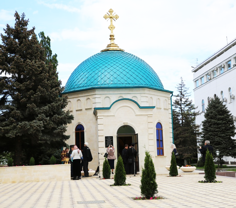 Храм Святого равноапостольного Князя Владимира в Махачкале